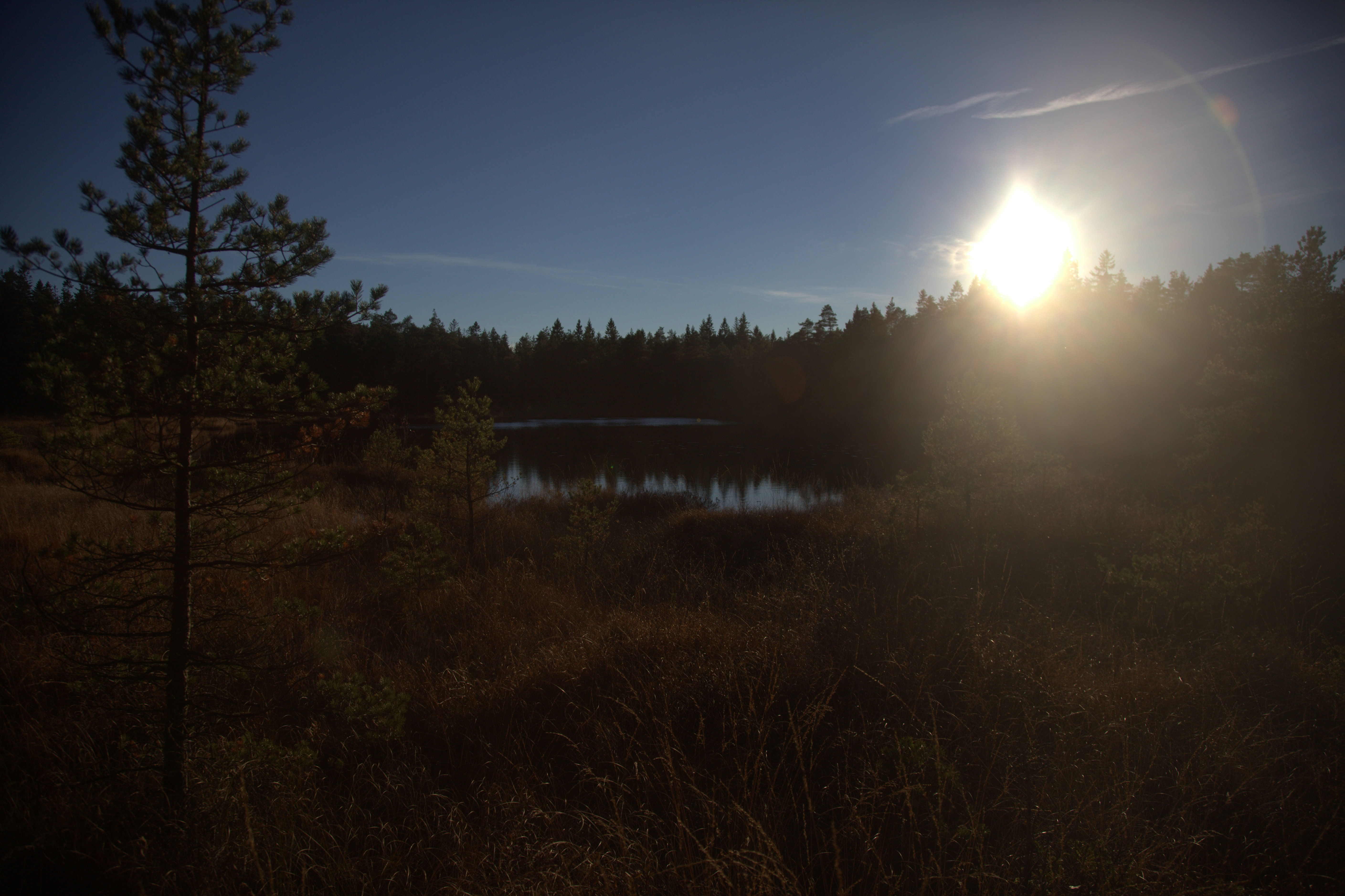 Svartevatten i Kungälvs kommun